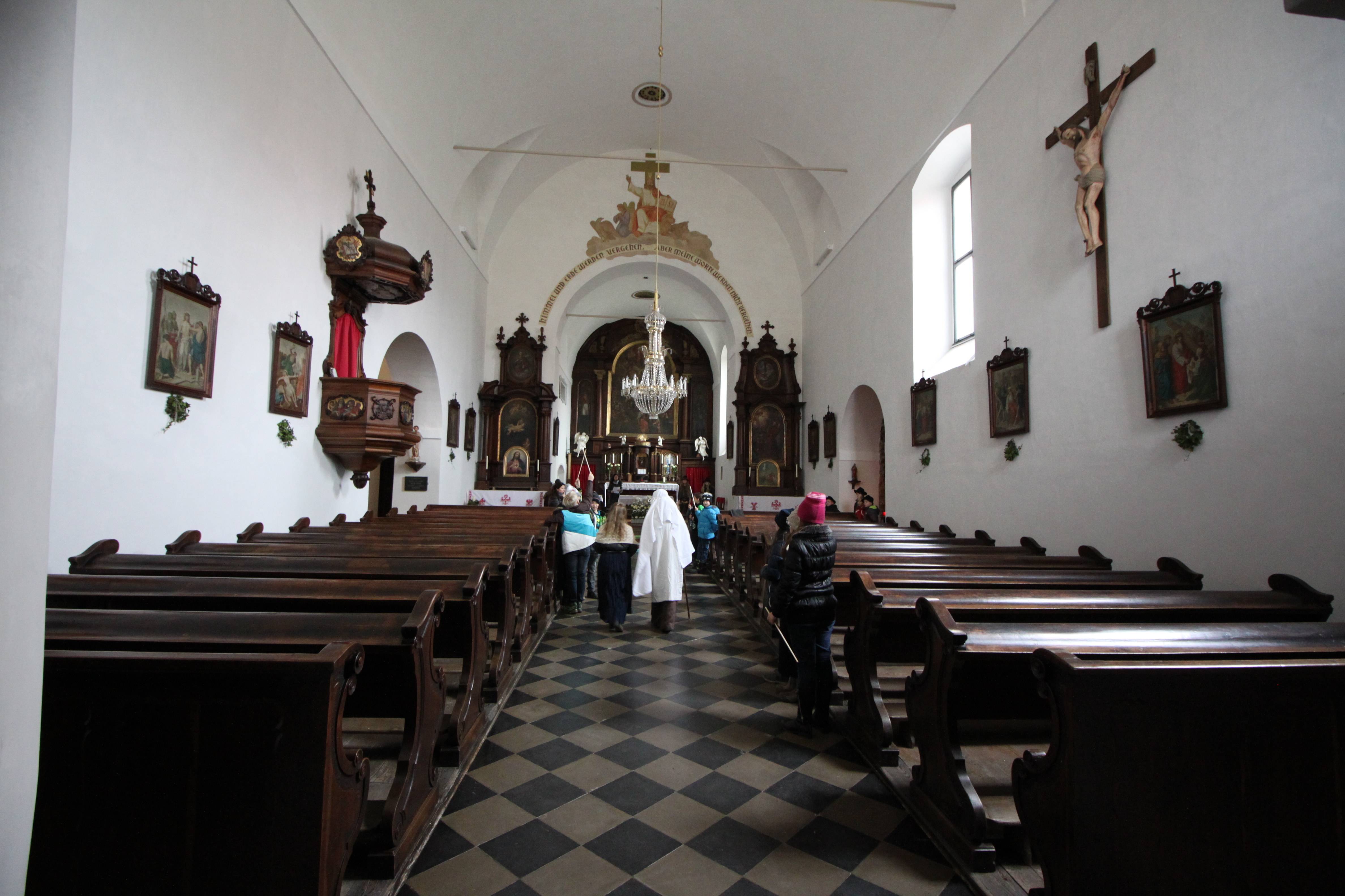 Ehem. Kapuzinerkirche hl. Schutzengel, Herbergssuche in Bethlehem, Probe mit Kindern